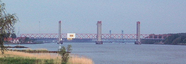 Spijkenisserbrug